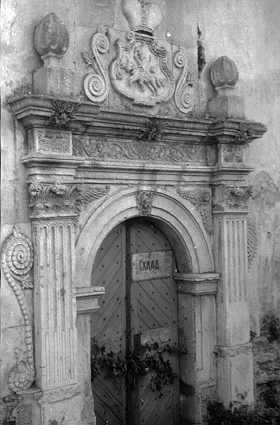 Чернелиця,_Городенківський_район_—_костел.jpg: Чернелиця (Городенківський район Івано-Франківської області). Костел. Головний портал. Вигляд з північного заходу.